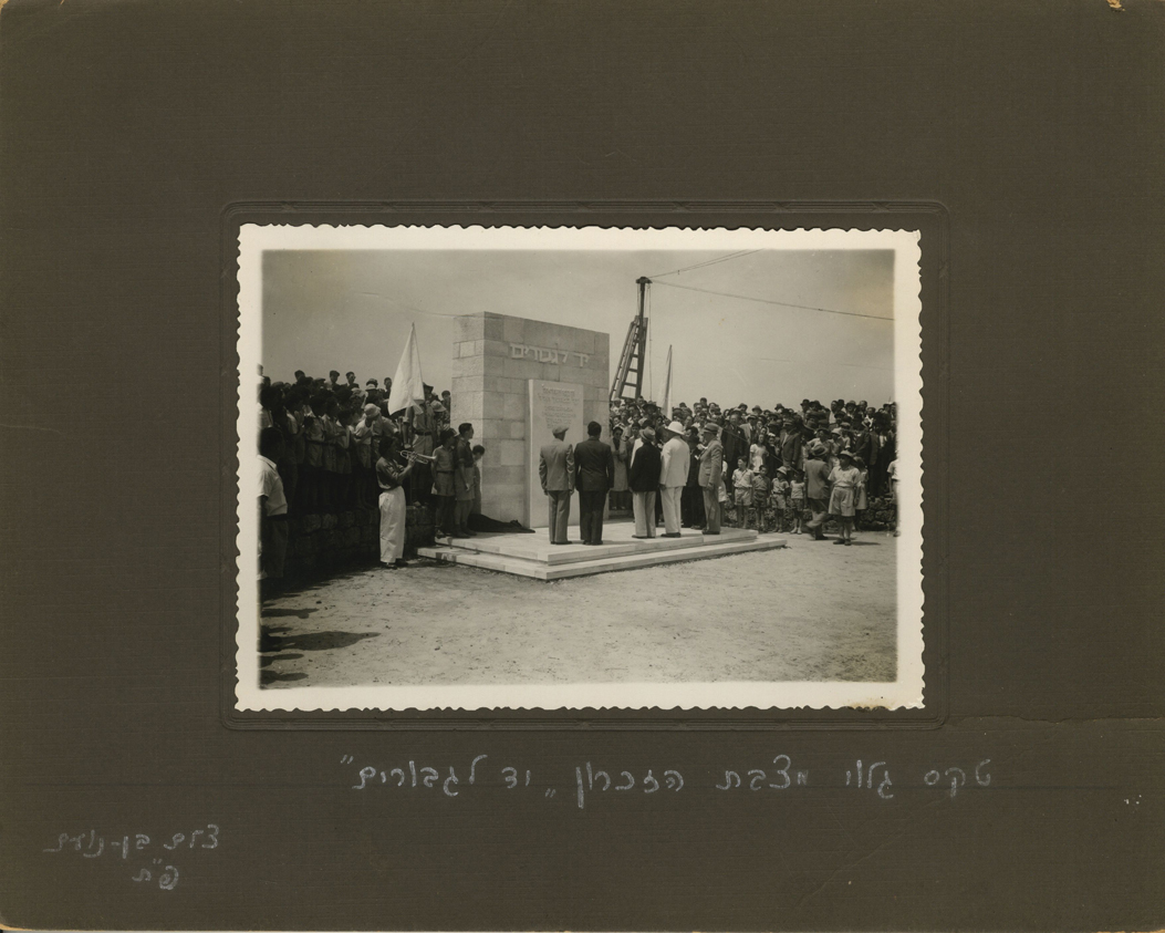 חנוכת אנדרטה לחללי מאורעות תרפ"א 1921 במקומה הראשוני, צומת רחוב פינסקר פינת רחוב אבשלום גיסין. 1946